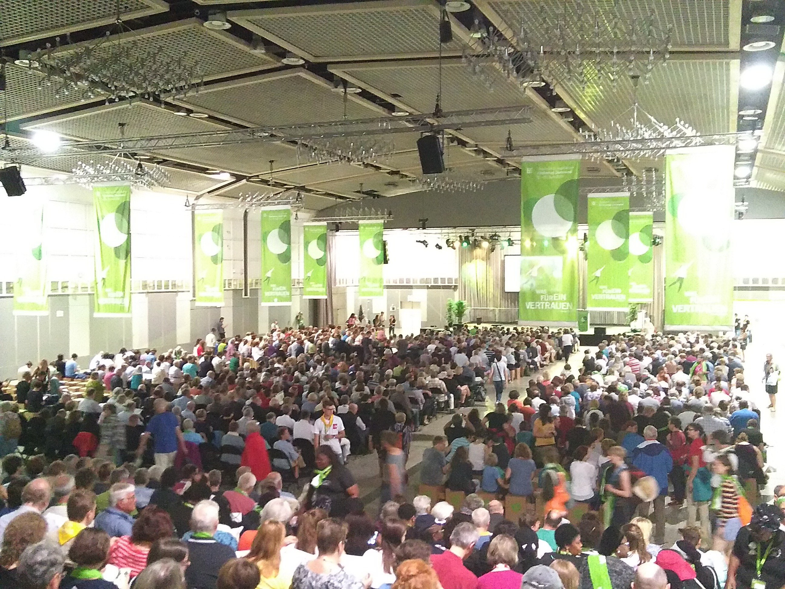 kurz vor Beginn aufgenommen in der Messe Dortmund